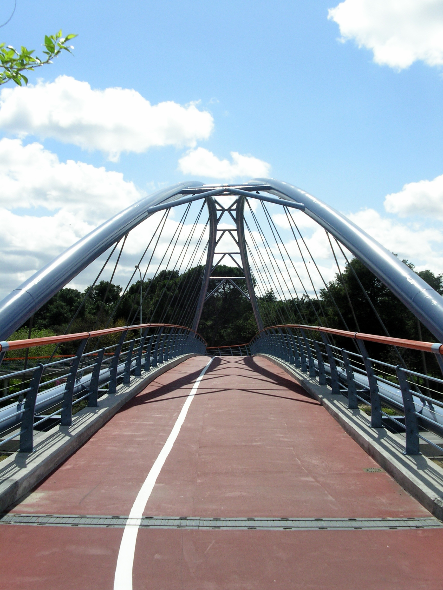 2008-04-13 Puente ciclista del anillo verde sobre la A6